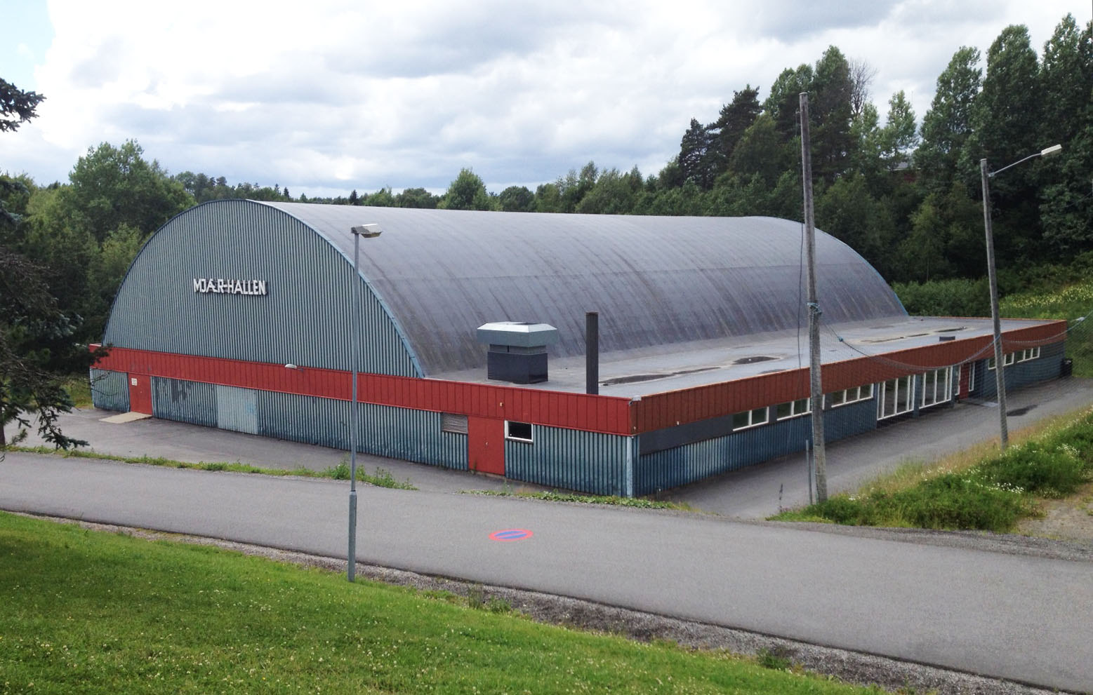 Mjærhallen, idrettshall i Ytre Enebakk, sør for Oslo